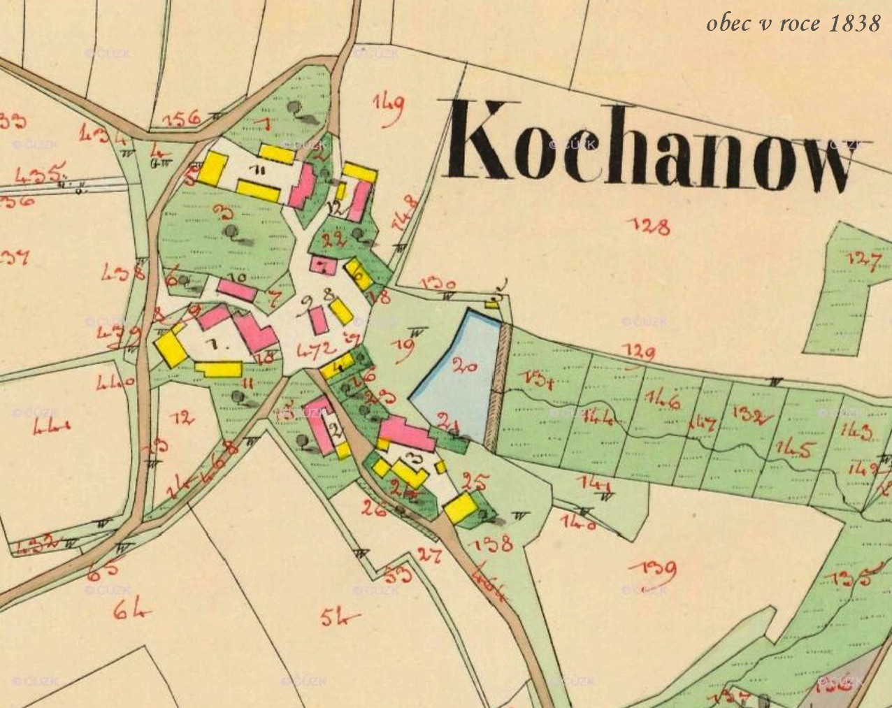 obec Kochánov - část císařského otisku stabilního katastru 1838